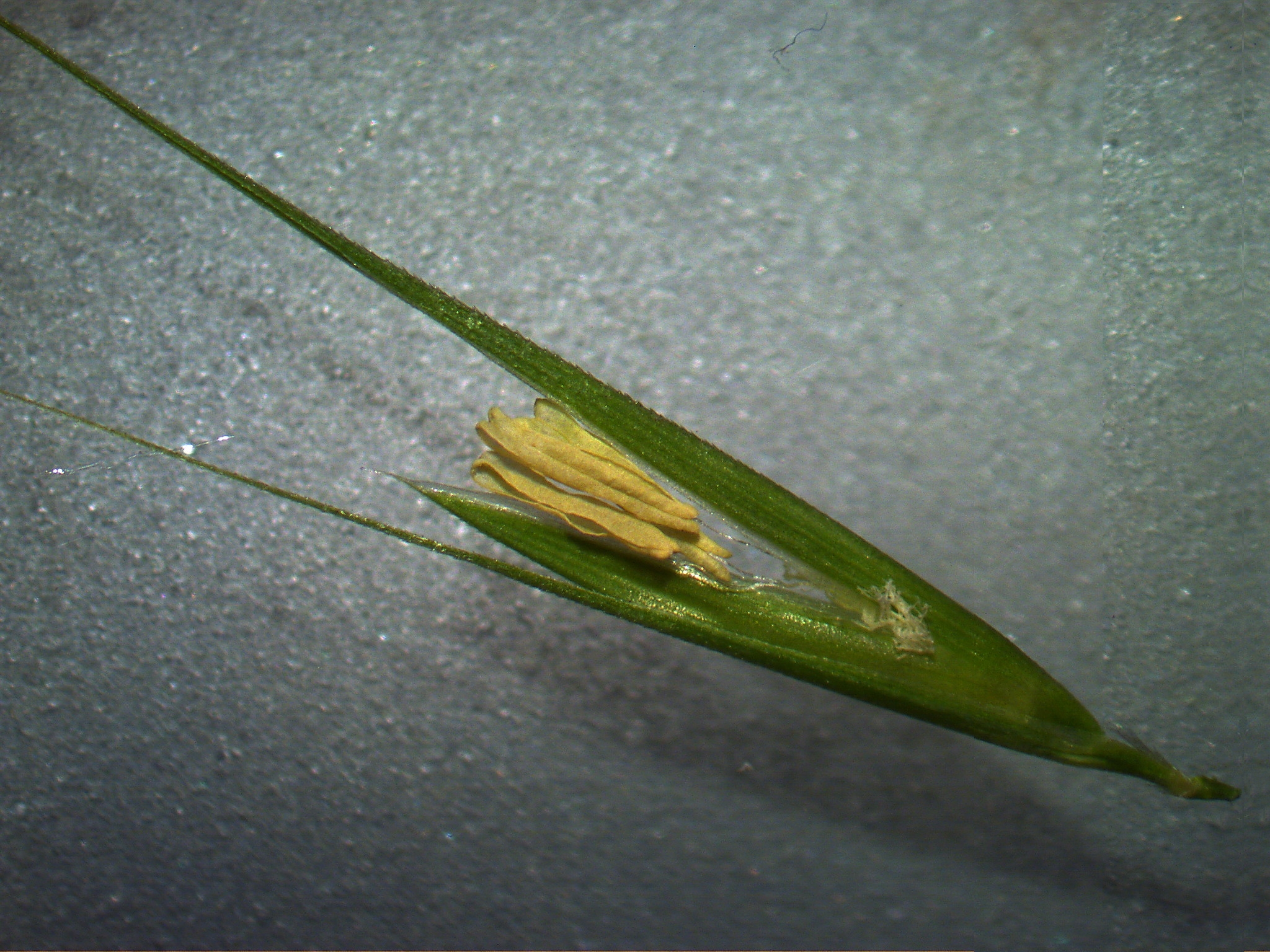 Microlaena stipoides spikelets5